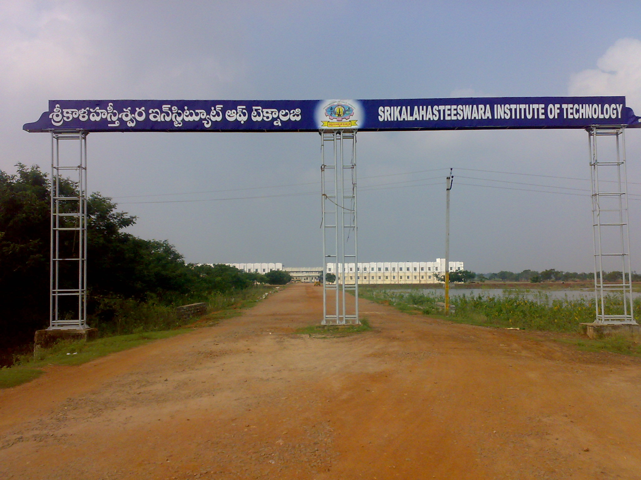 for Skit college web page